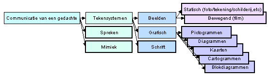 Eigen gemaakte medie. Onderwerp geeft aan welke wijzen van communicatie er zijn in het algemeen (linker deel) en specifiek t.a.v. grafische visualisatie (rechter deel). De dik/zwart omrande delen zijn de uitdrukkingsvormen.